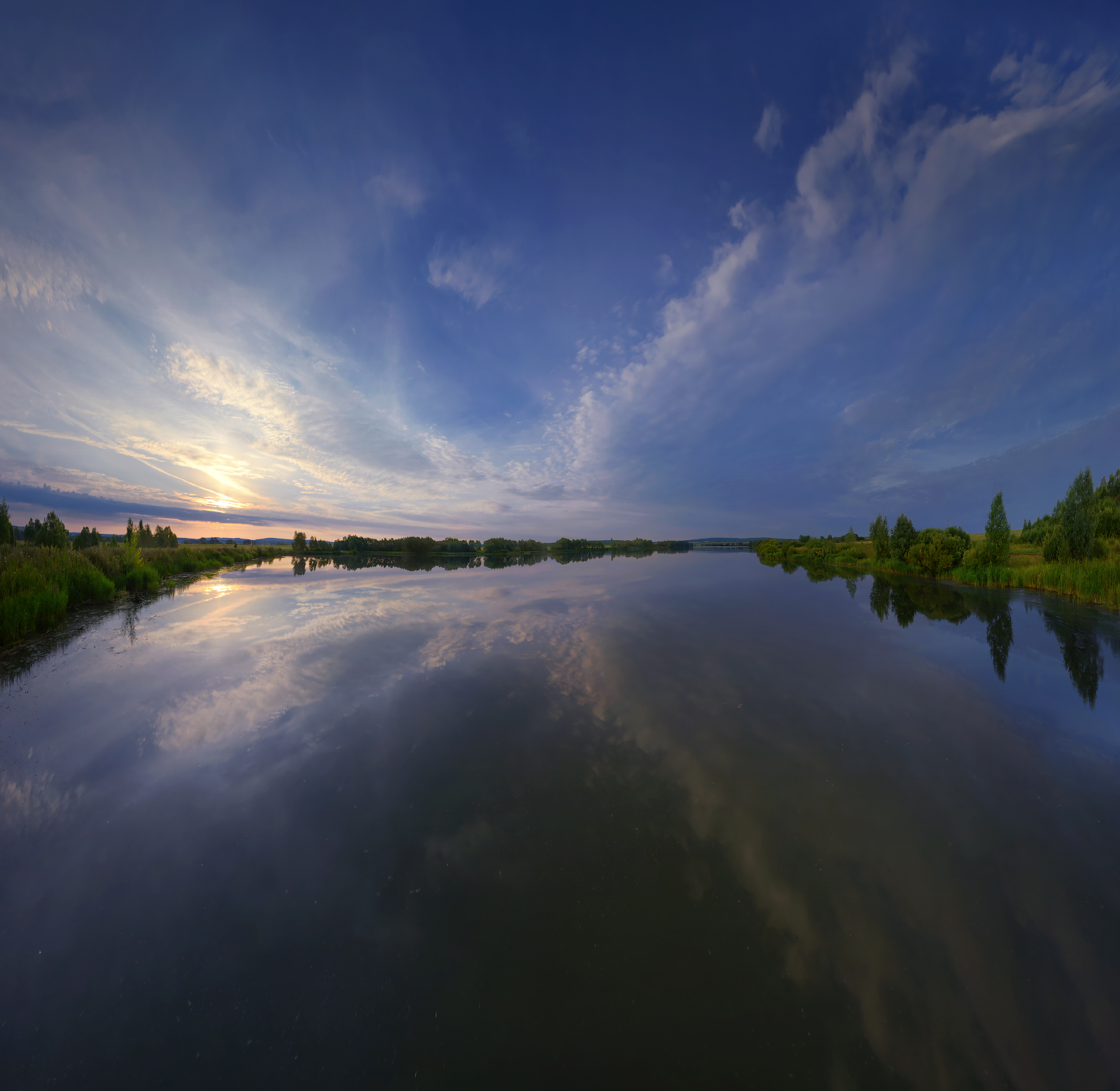 Tatyanovskiy prud (literally pond Tatyanovsky) in Ishimbai rayon Татьяновский пруд, Ишимбайский район